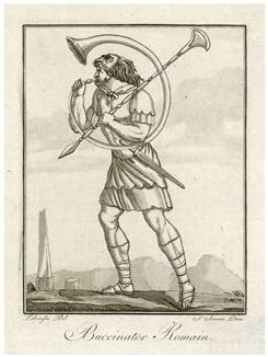 Стилизованное изображение буцинатора в виде постера.